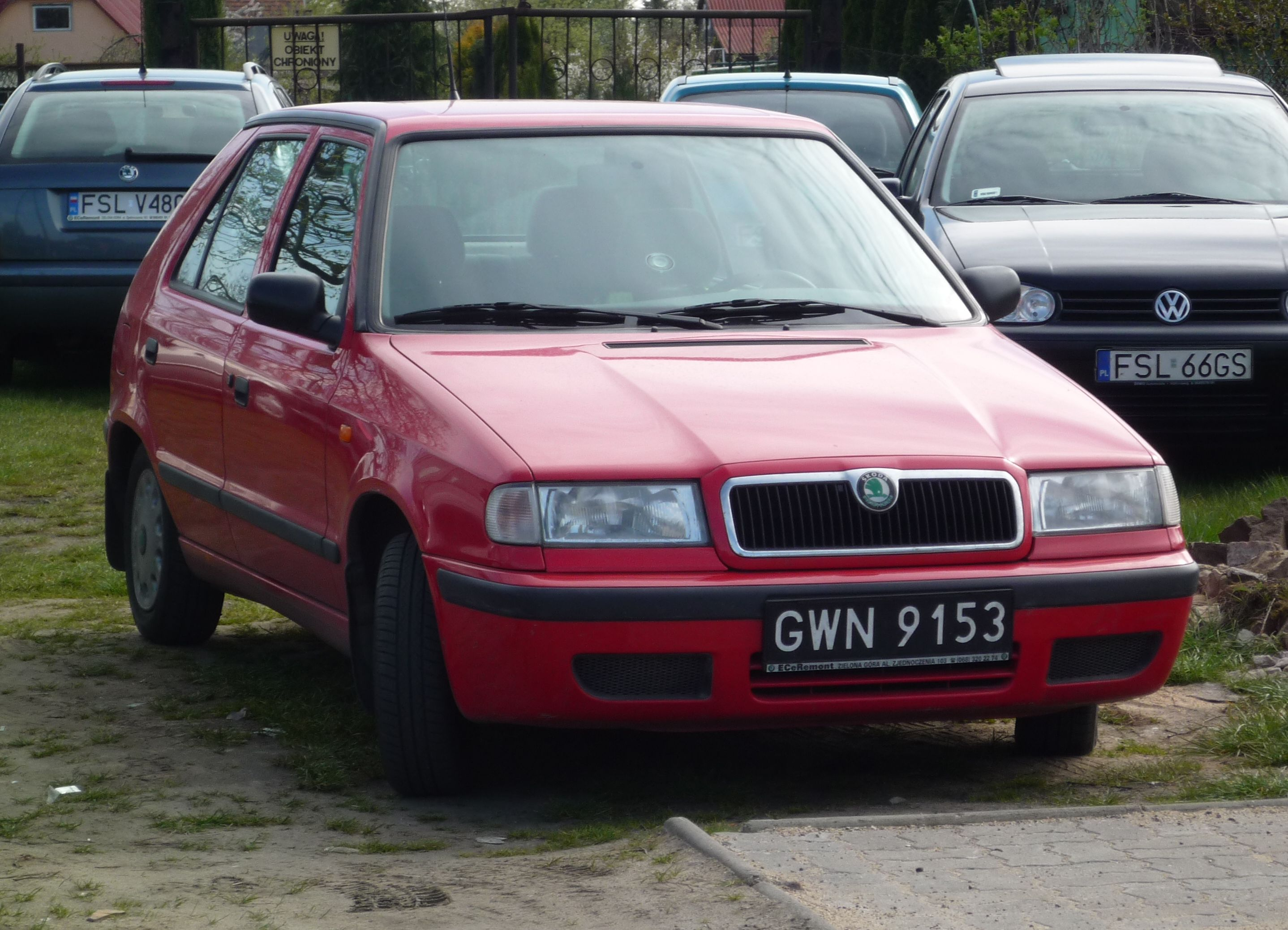 Škoda Felicia II w Słubicach.